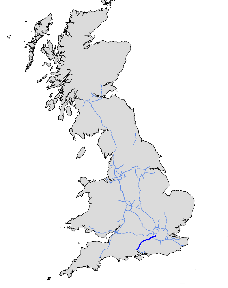 M3